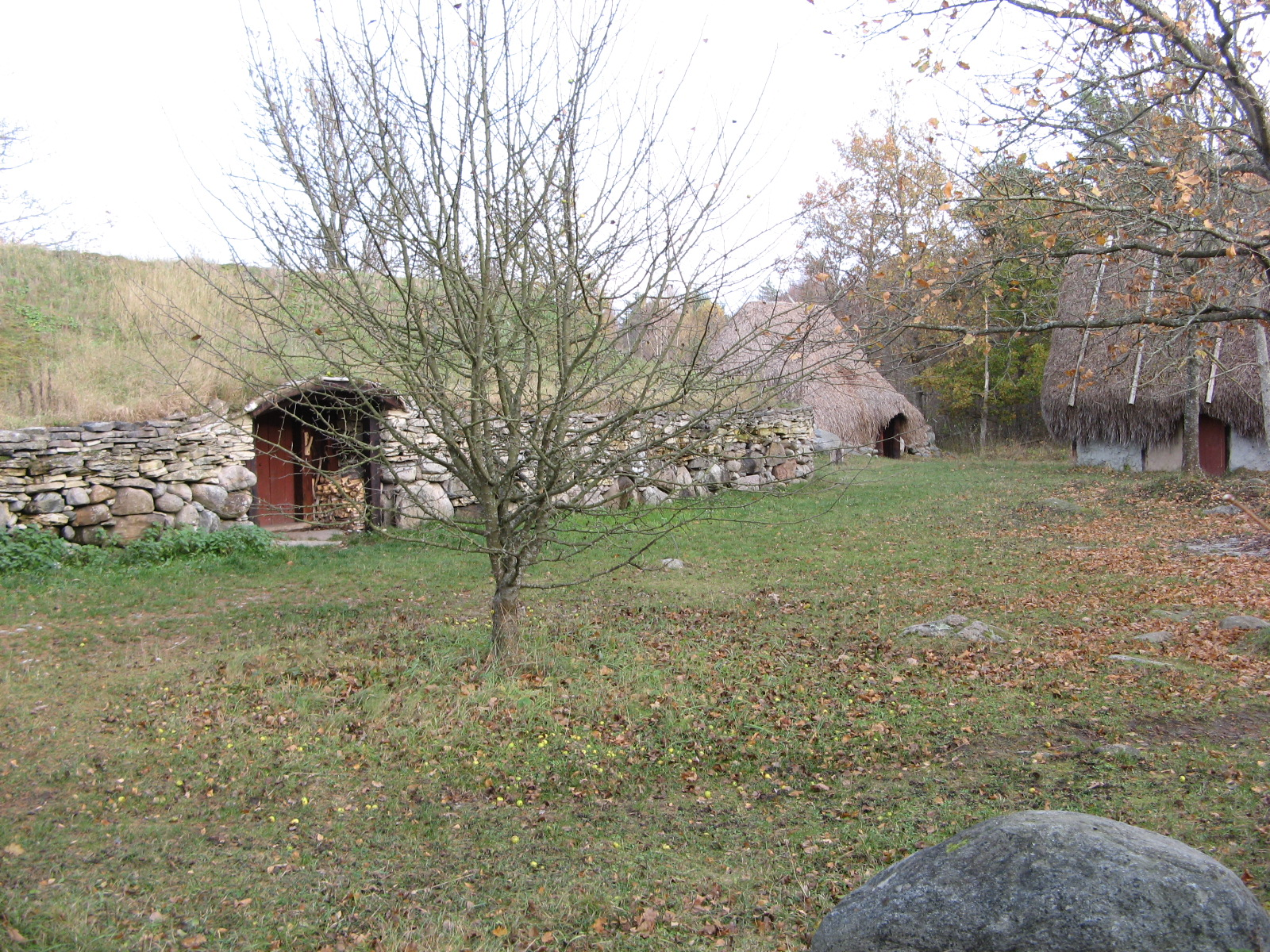 Lägerskolan Stavgard hus med torvtak